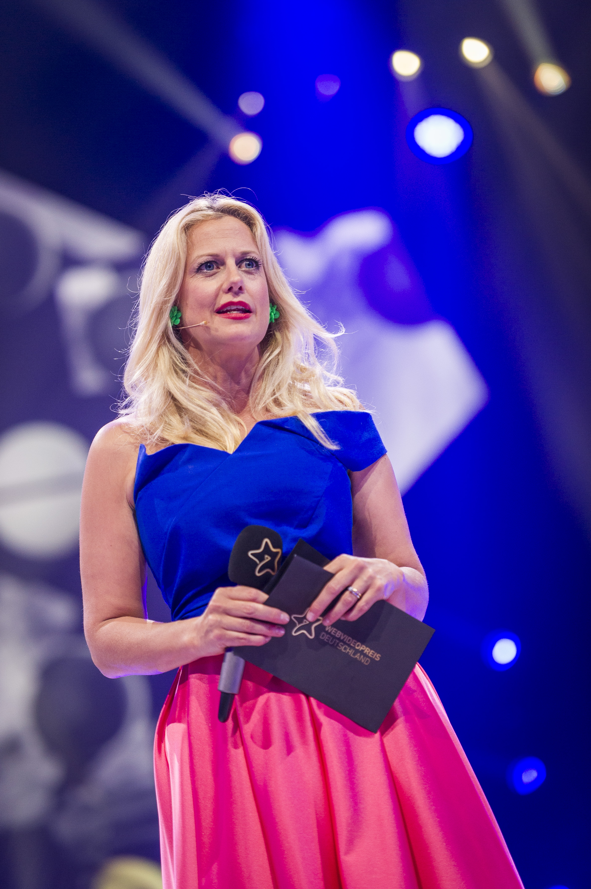 Webvideopreis - ISS Dome - Düsseldorf - 01.06.2017